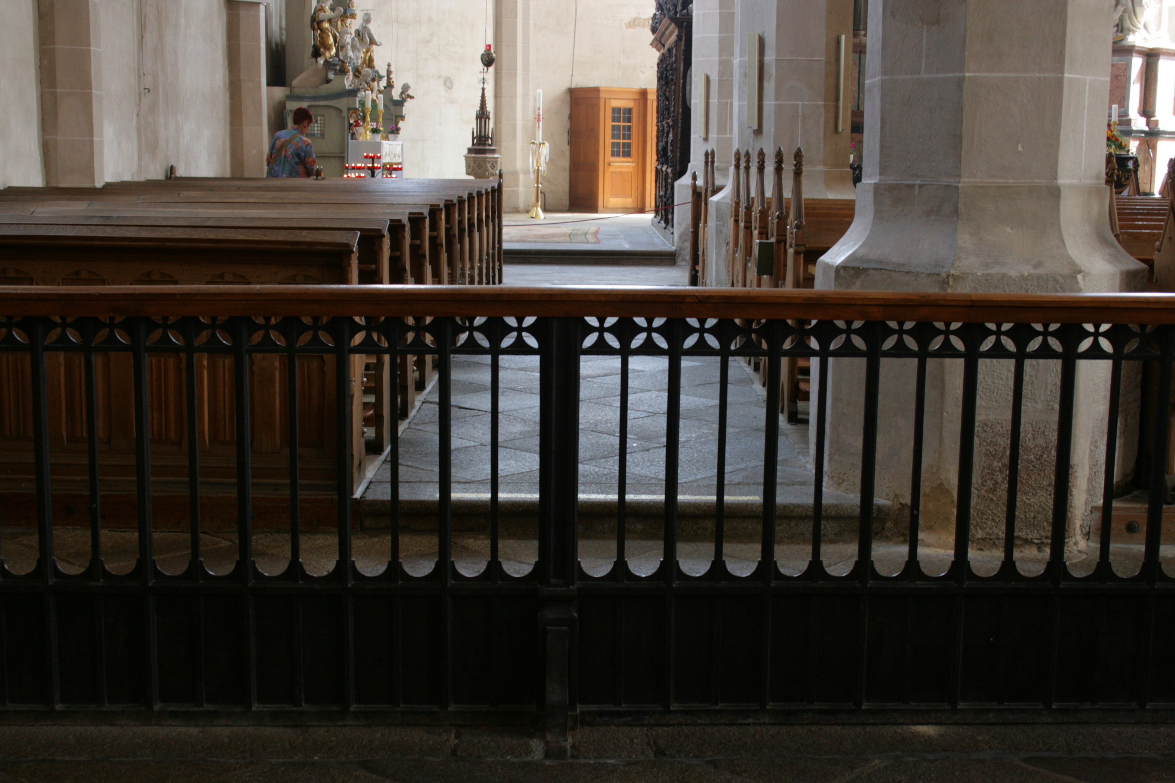 Dom St. Petri in Bautzen, Zaun zwischen dem evangelischen (vorne) und katholischen (hinten) Teil Hornjoserbsce: Tachantska cyrkej swj. Pětra w Budyšinje; płót mjez ewangelskim (prědku) a katolskim (zady) dźělom.